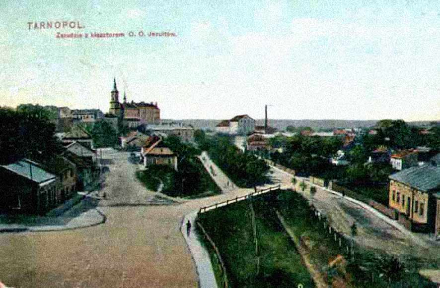 Костел Єзуїтів у Тернополі. вигляд зі сторони теперерішньої залізниці